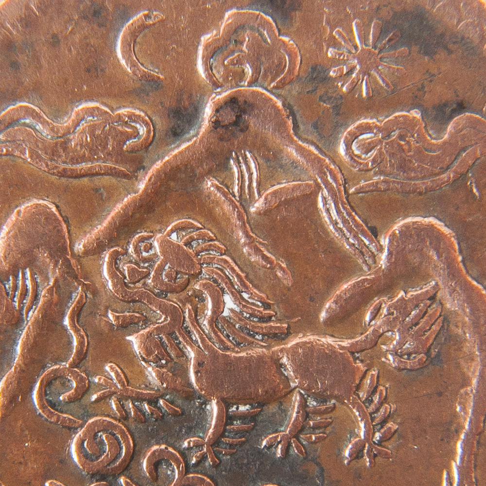 Fotografía de un detalle del anverso de una moneda del Tíbet de 5 sho que he tomado la mañana del 7 de diciembre de 2016 con una cámara NIKON D90. Objetivo: NIKKOR 17-55 + Filtro 10 X Polaroid.